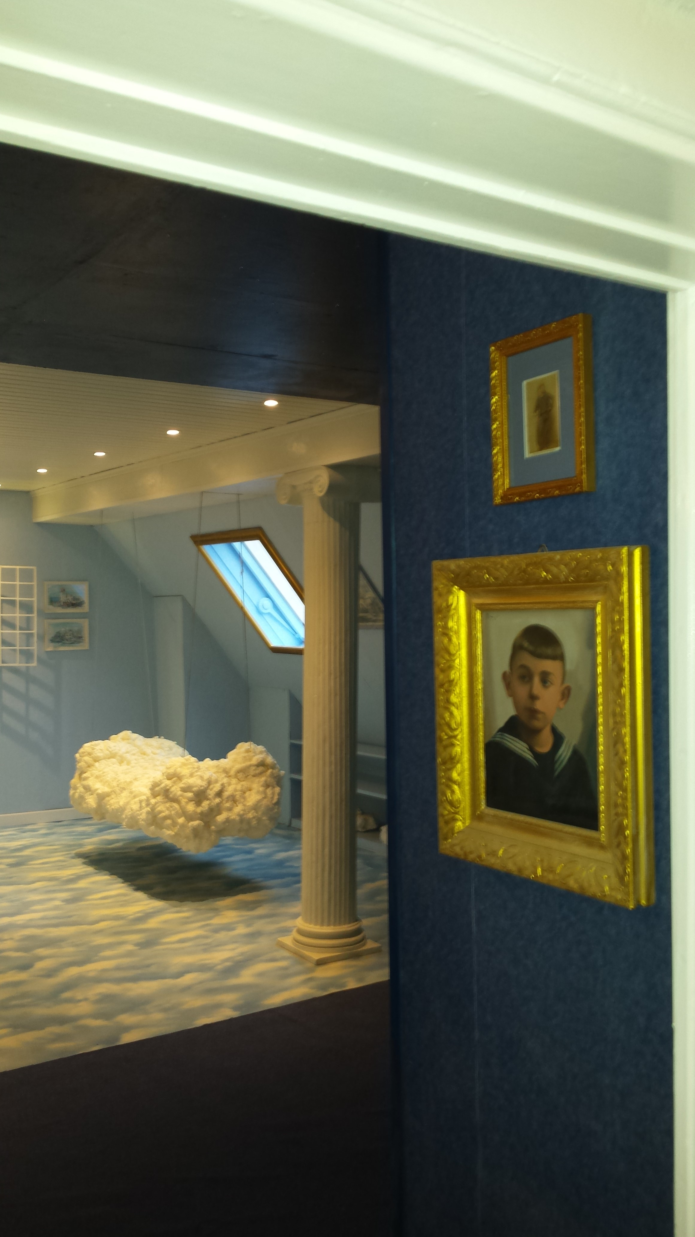 Im Obergeschoss des Museum Blau in Schwetzingen kann man die Naturgeschichte der Farbe Blau erleben und von einer Wolkenschaukel den blauen Himmel betrachten.